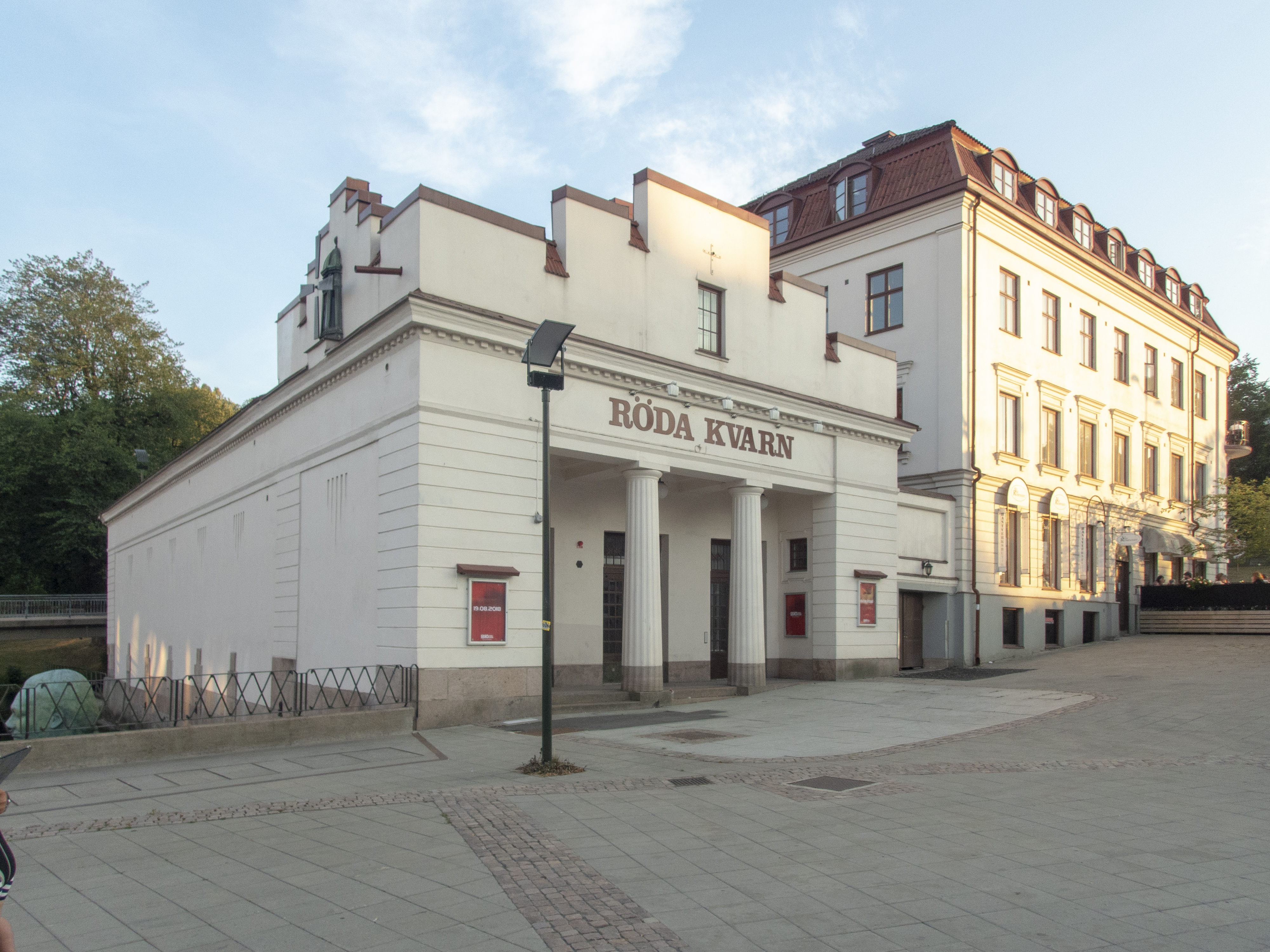 Biografen Röda kvarn i Borås. Byggnadsår 1914. Arktekt: Lars Kellman